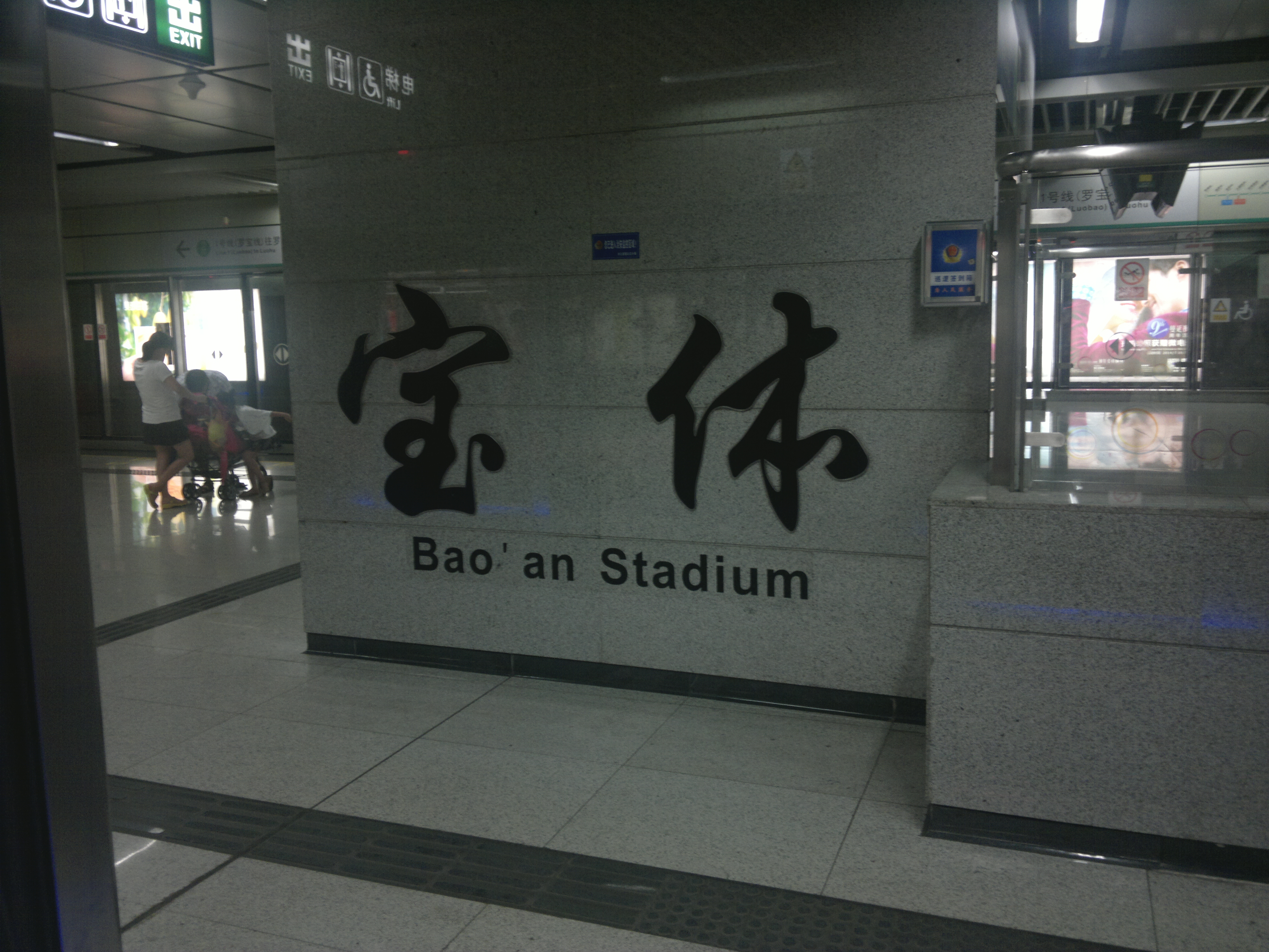 宝体站站台书法大字